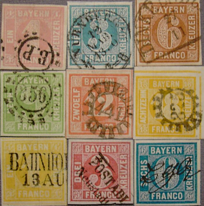 Bayerische Briefmarken von 1849 - 1862